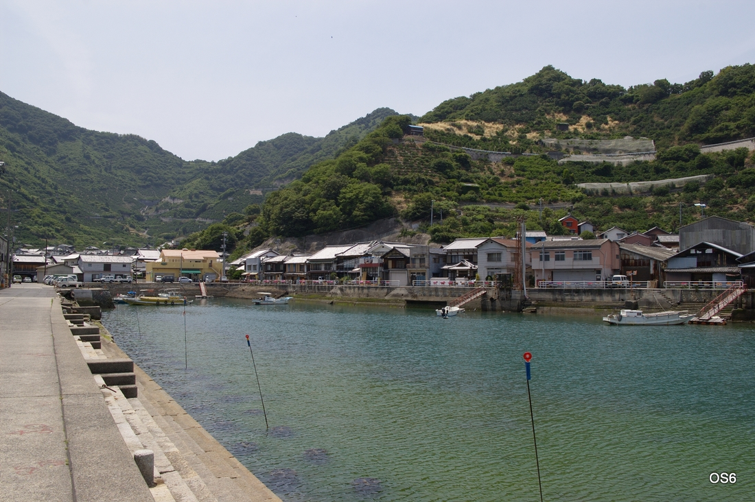 豊町大長01